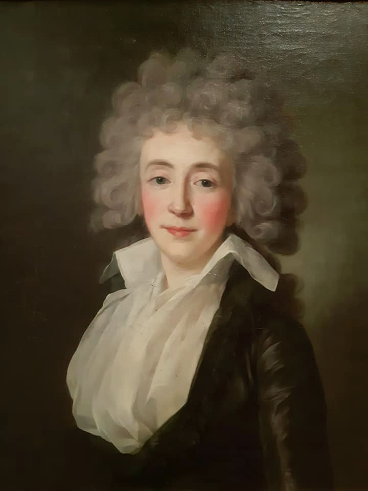 Княгиня Екатерина Петровна Барятинская (1750—1811)